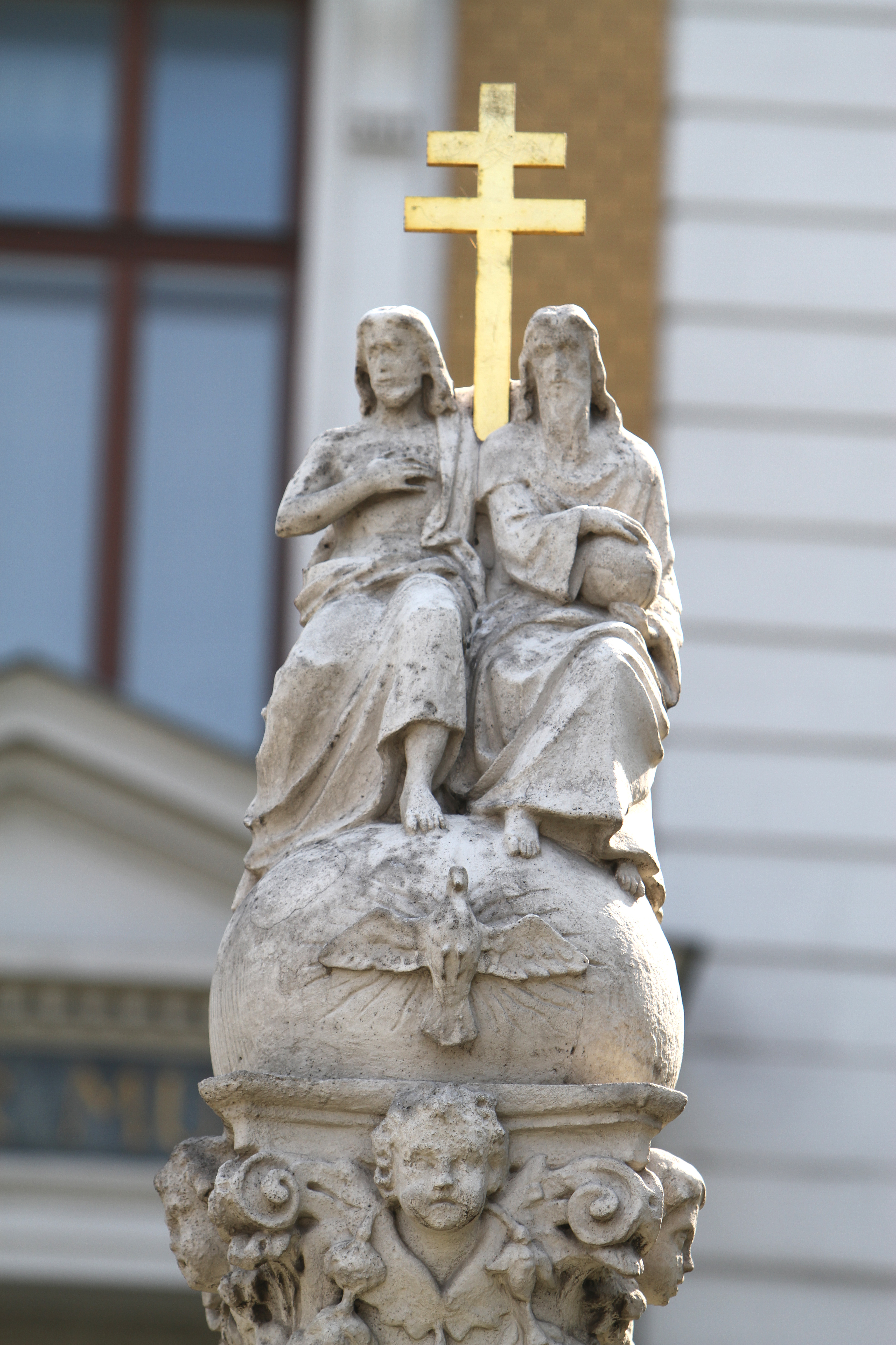 Dreifaltigkeitssäule